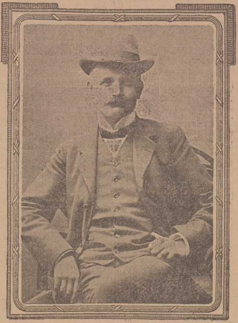 Bild ur Dagens Nyheter 1909 föreställande den svenska kompositören Felix Körling.